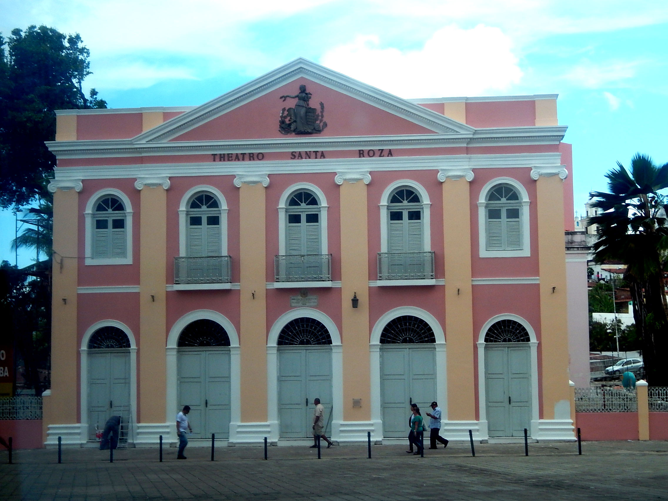 Teatro Santa Rosa em João Pessoa, Paraíba.